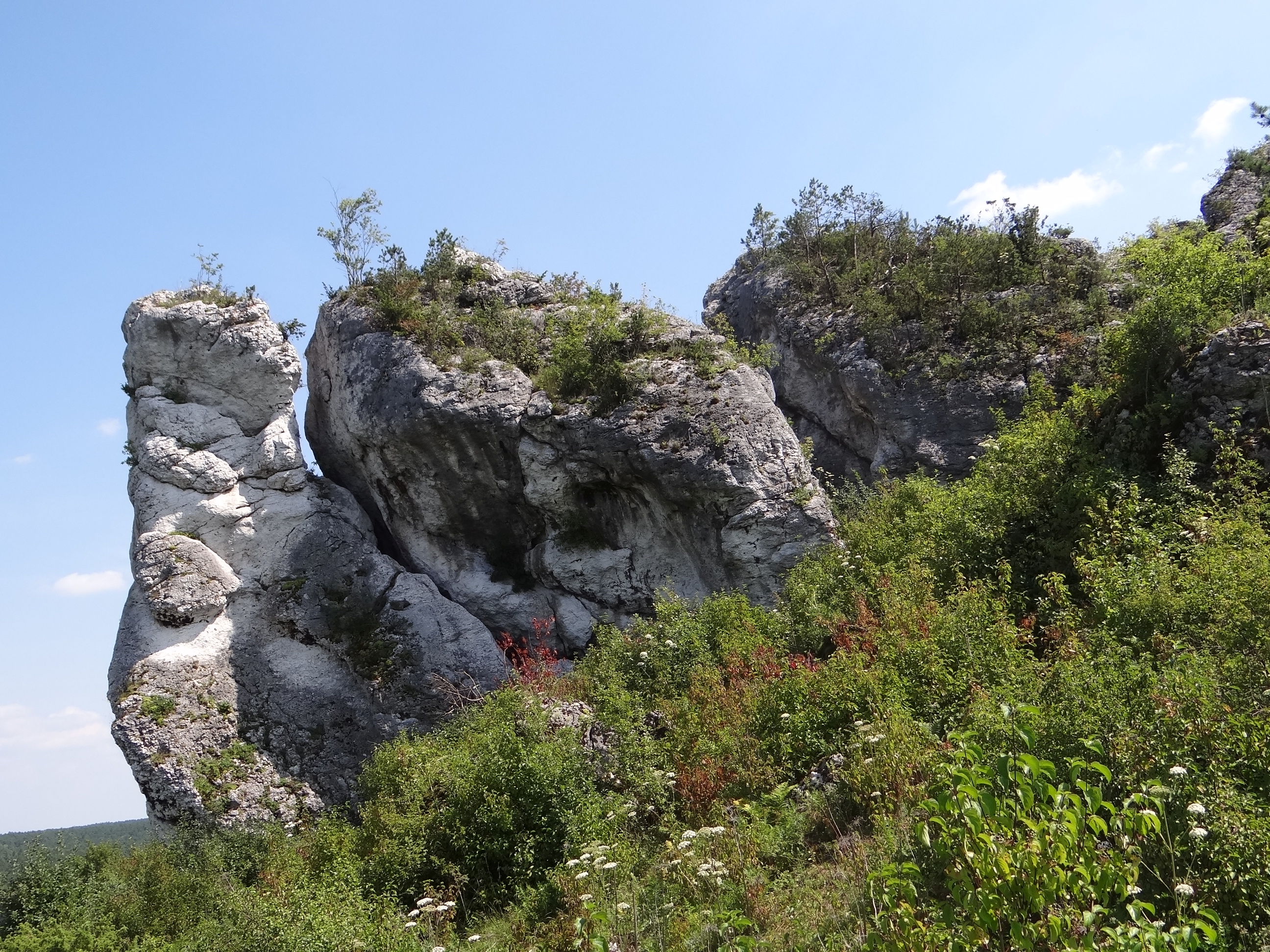 Skały Mirowskie. Grupa Trzech Sióstr od zachodu